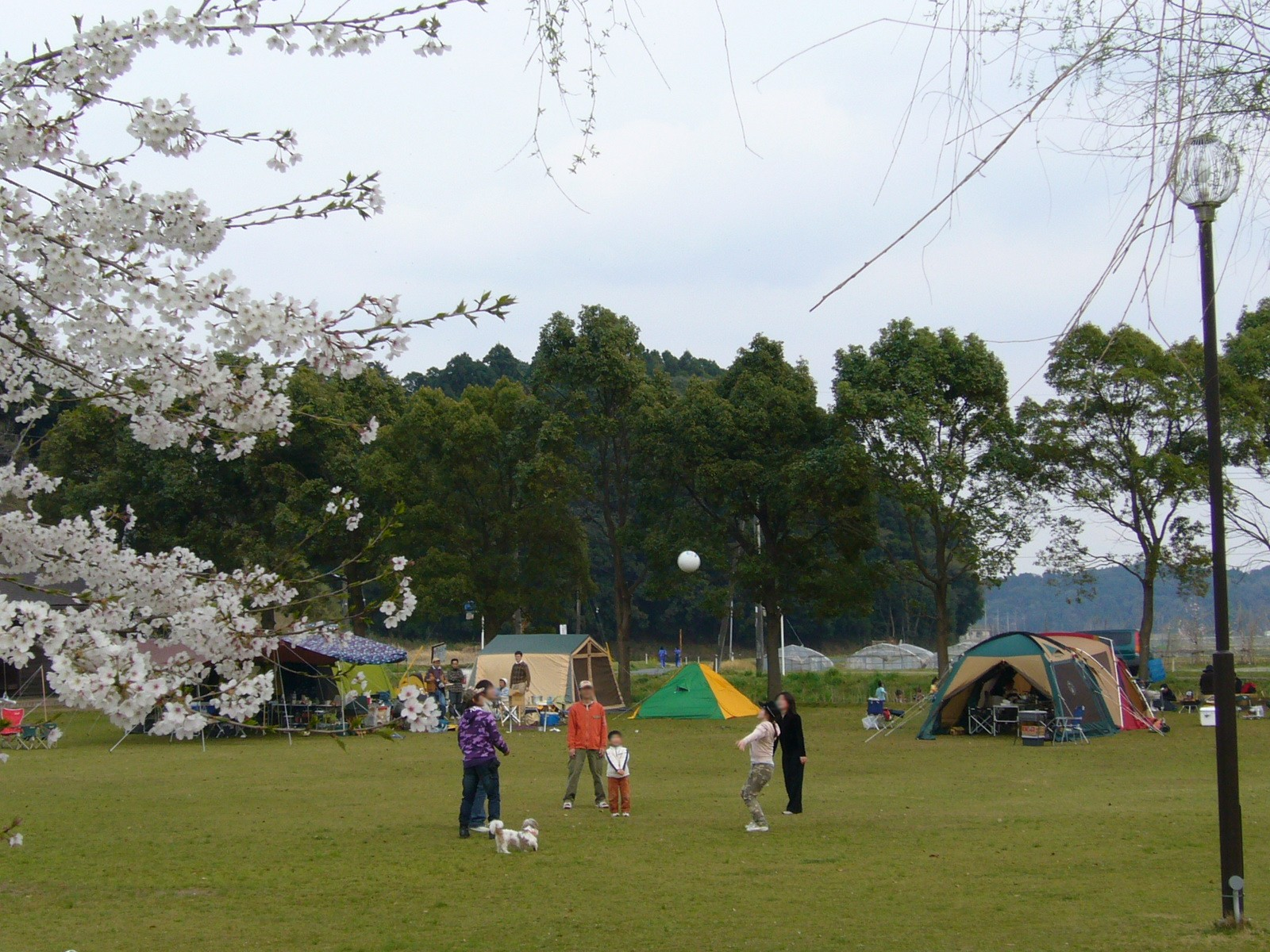 tatibana hureai park,katori-city,japan